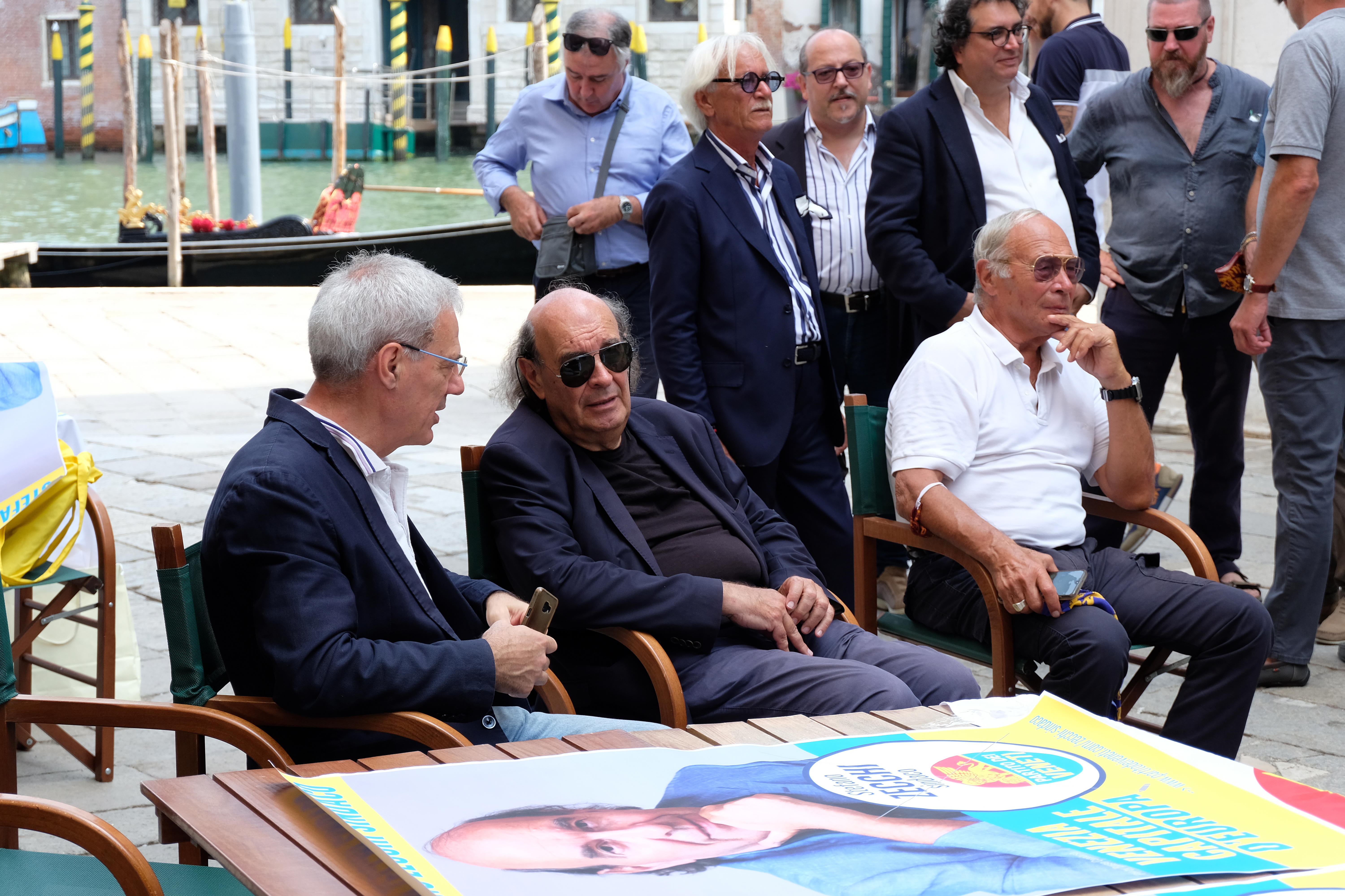 Pressekonferenz der Partito dei Veneti mit Stefano Zecchi und Pierangelo Del Zotto, August 2020